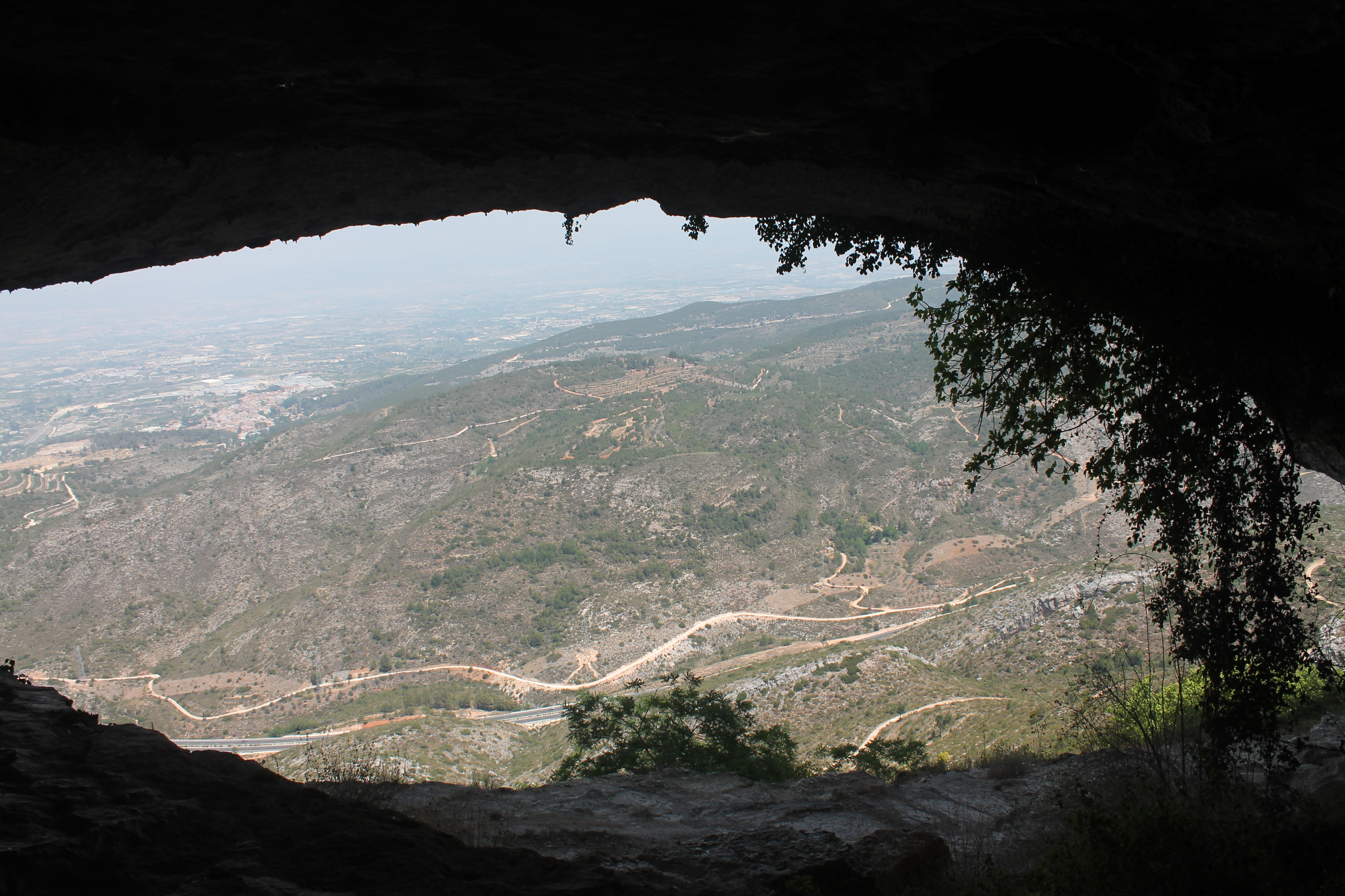 Vista desde la Cova Alta